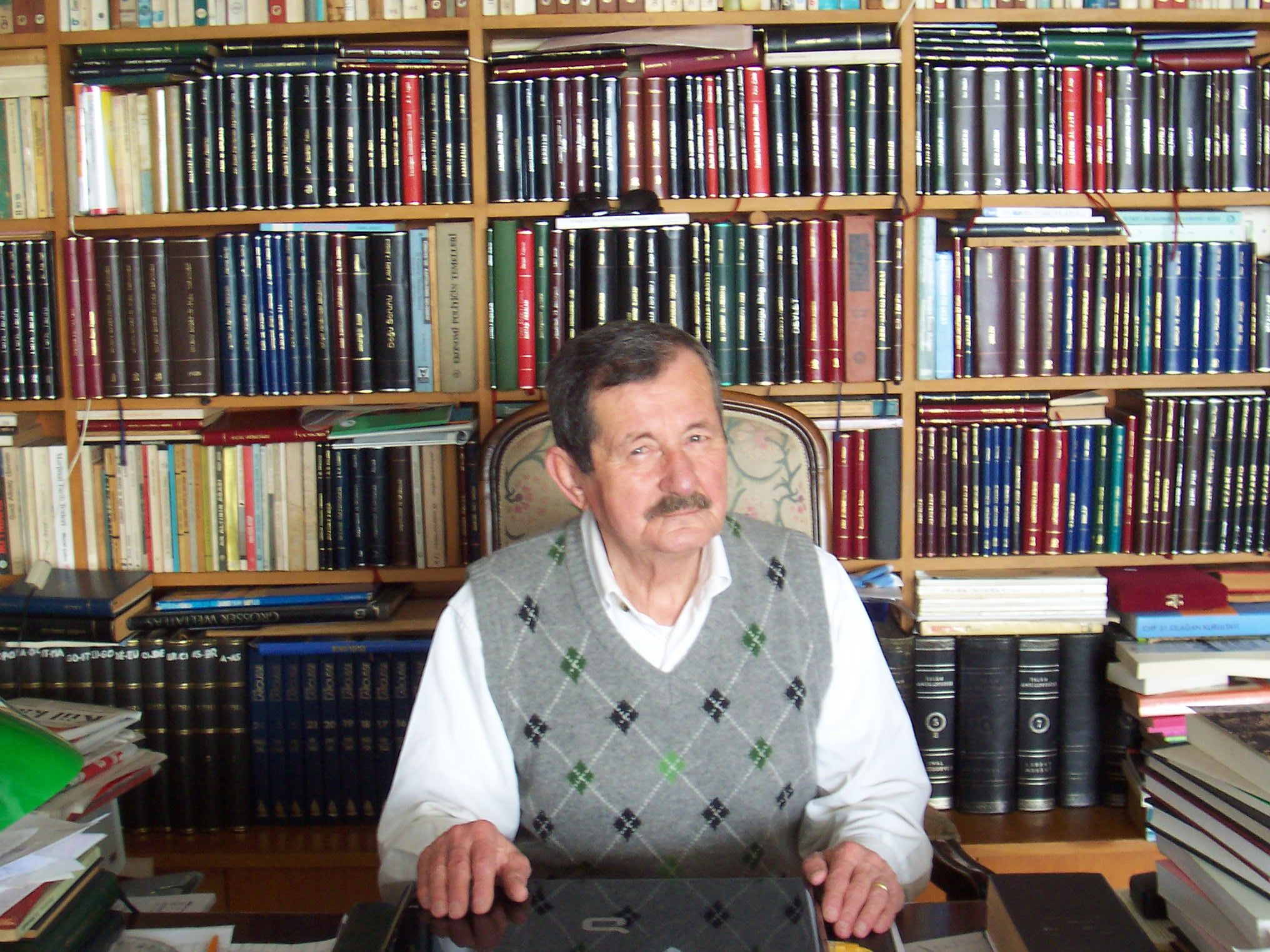 Photographie de l'auteur turc Erol Toy, prise par Manu35 avec pour but d'illustrer sa page Wikipedia.